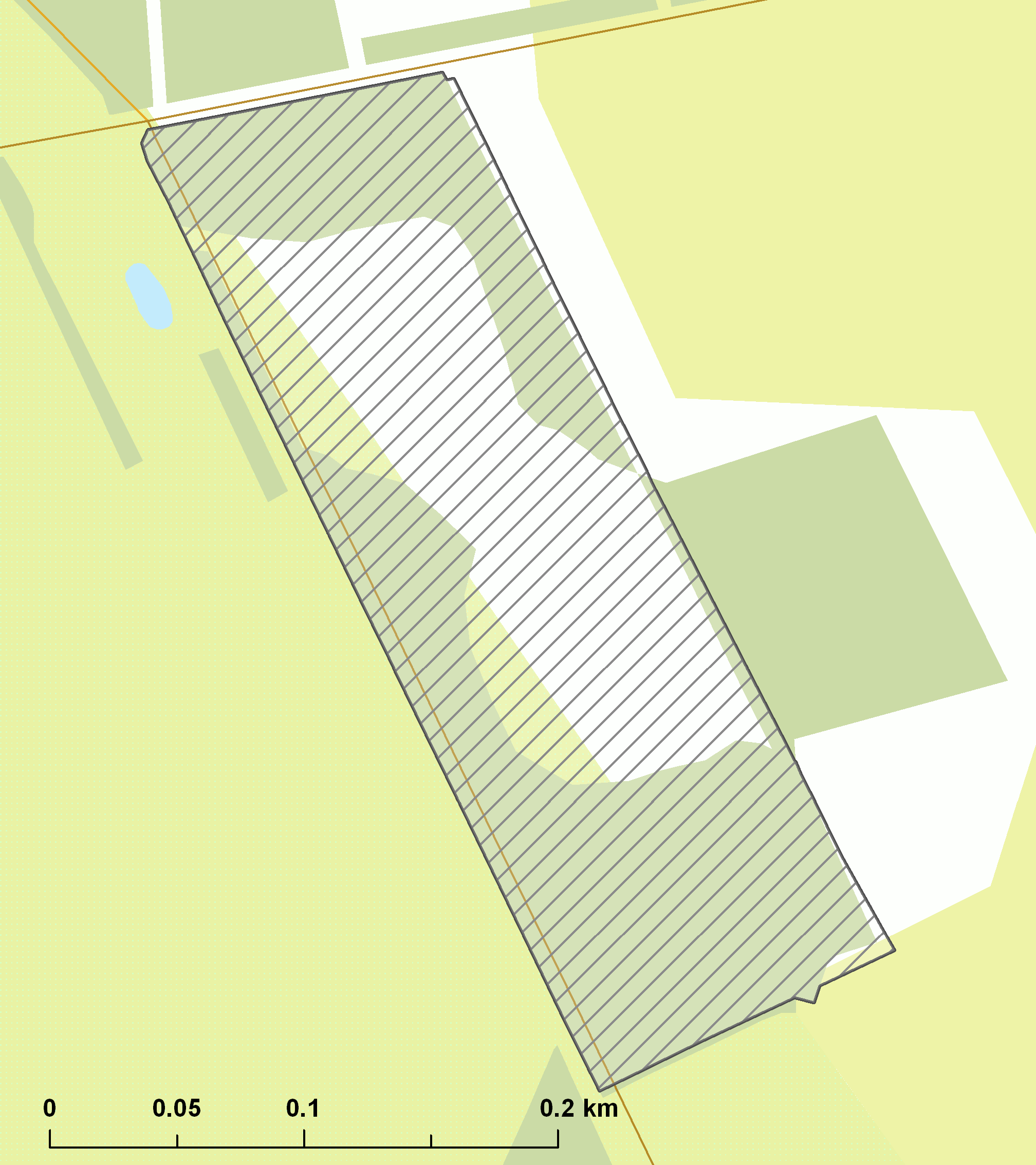 Natura2000 - Boddenbroek.png